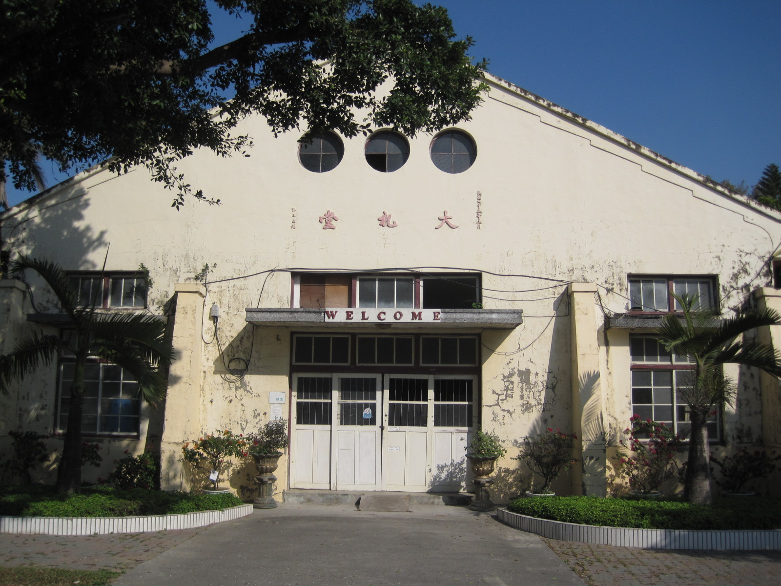 鹽水歡雅國小大禮堂。